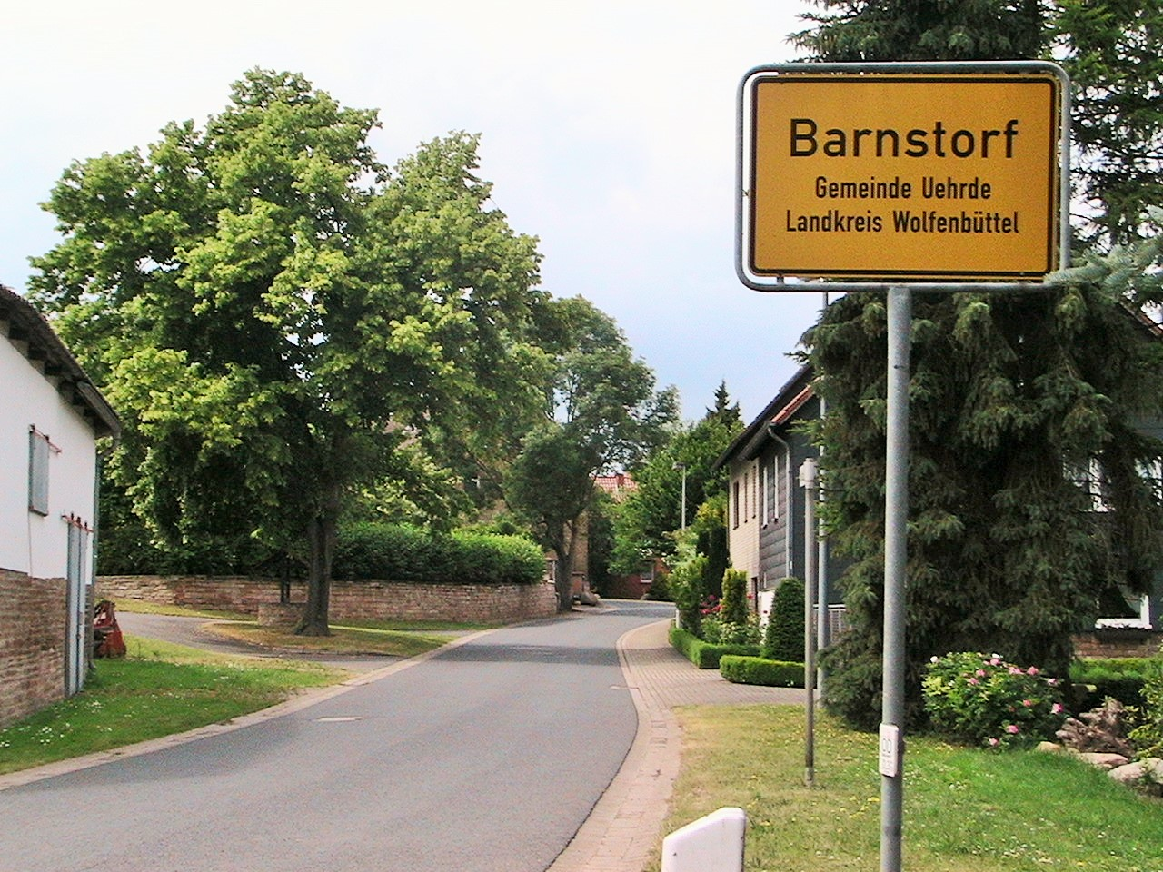 Barnstorf (Uehrde): Ortseingang von Watenstedt kommend (Osten)